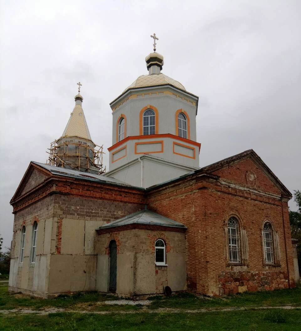 Церква, с. Благовіщенка, Більмацький район, центр села